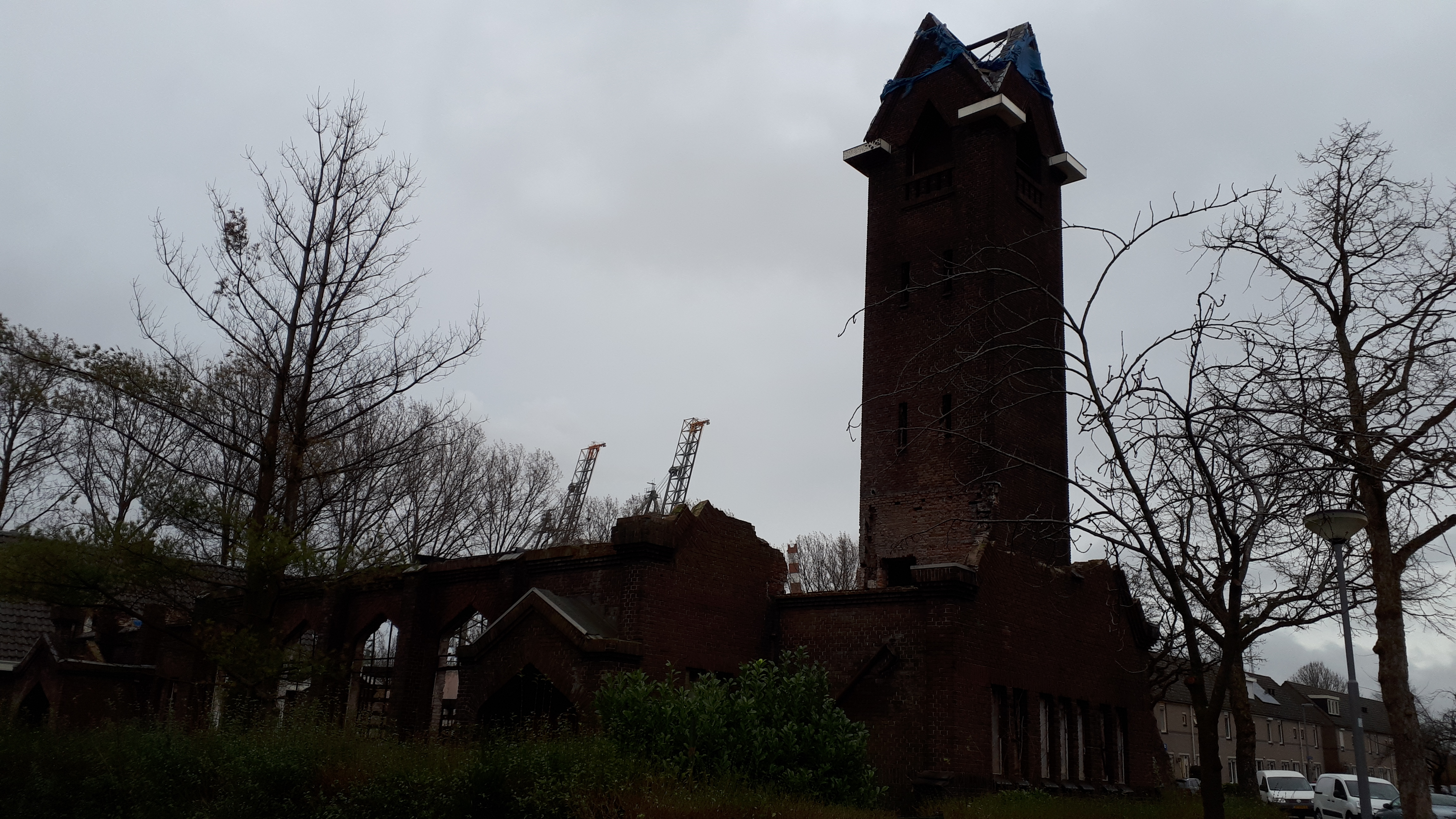 Julianakerk - Heijplaat Rotterdam. Door brand verwoest augustus 2017